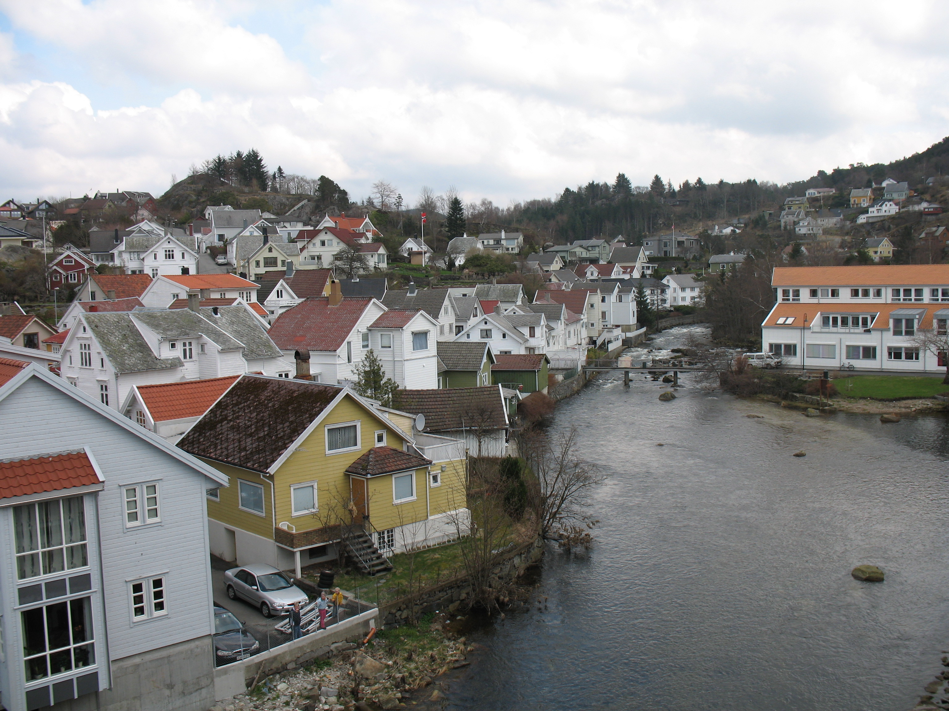 Egersund, Norway